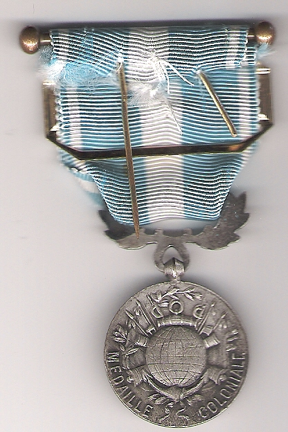 Médaille coloniale avec agraffe Maroc guerre du RIF (verso) du colonel Brébant